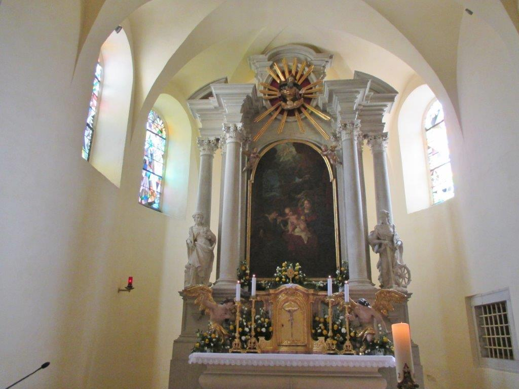 Hochaltar der Pfarrkirche Kaisersteinbruch. Das Bundesdenkmalamt Burgenland gratuliert 2002 dem Museums- und Kulturverein Kaisersteinbruch, Obmann Helmuth Furch, für die gelungene Restaurierung. Nach schwerer Beschädigung wurde ein dem Original vergleichbarer Zustand erreicht.